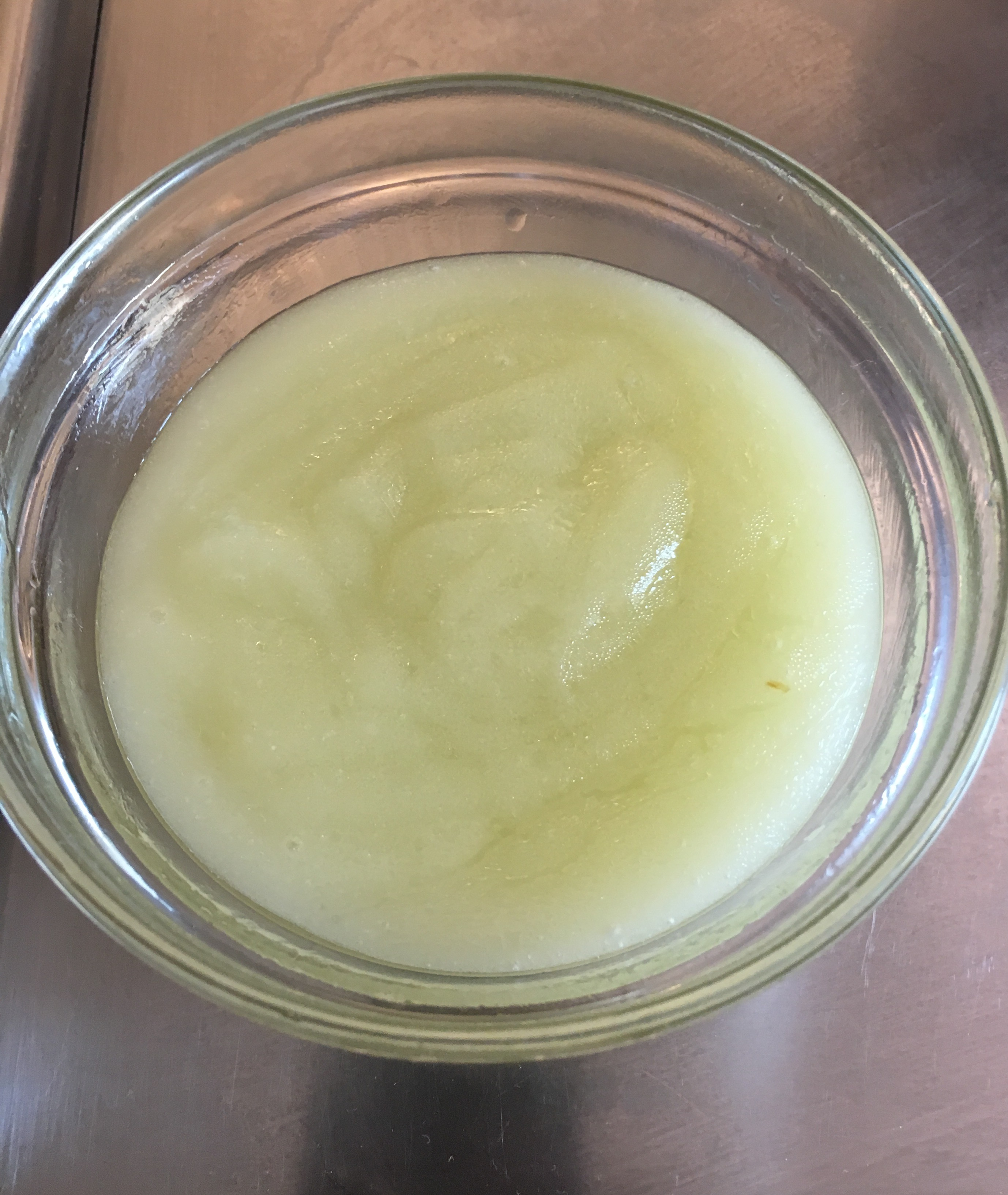 Maionesa d'oli elaborada segons mètode tradicional